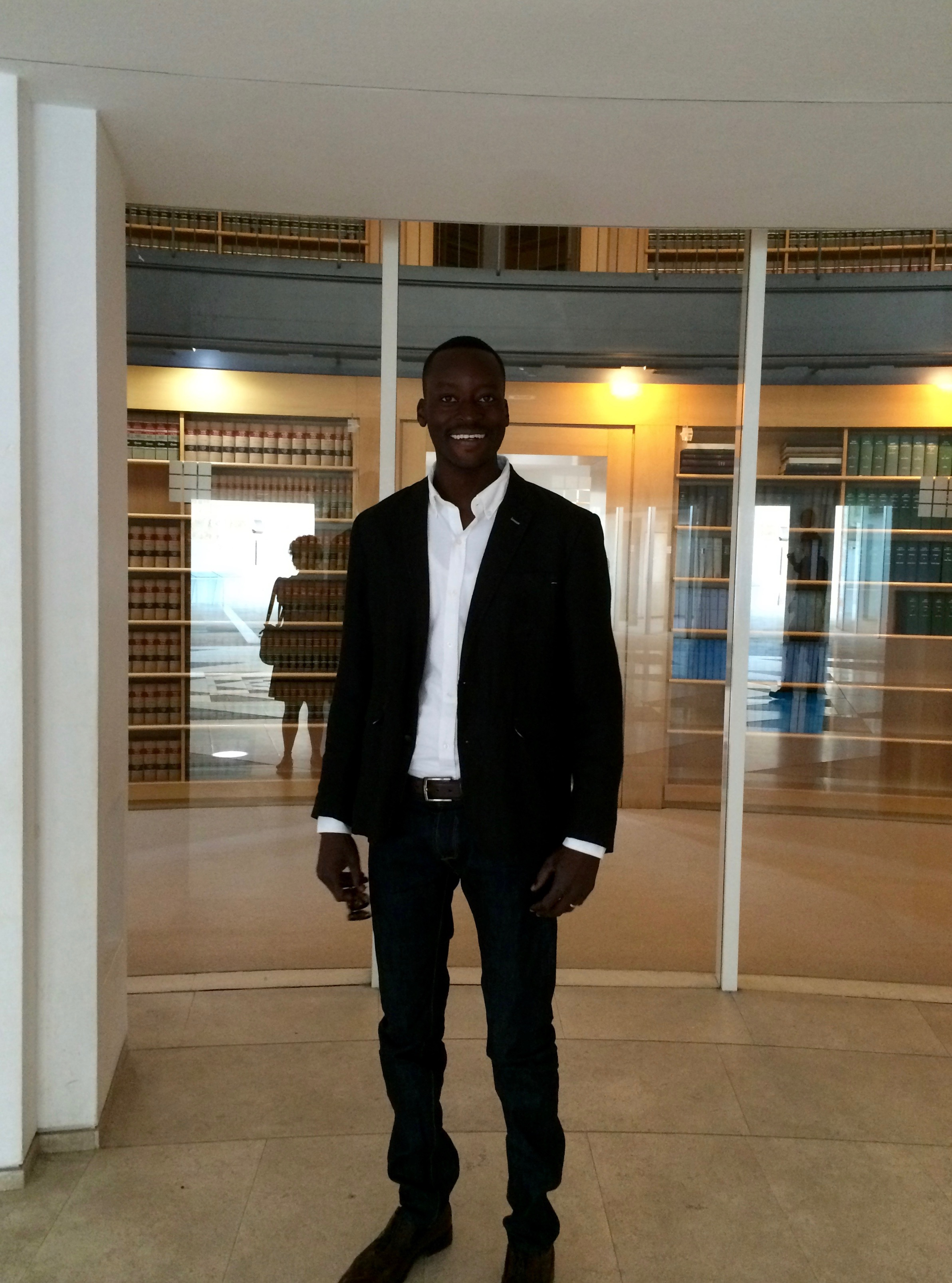 Mutasim Ali before a hearing on his case at Israeli Supreme Court